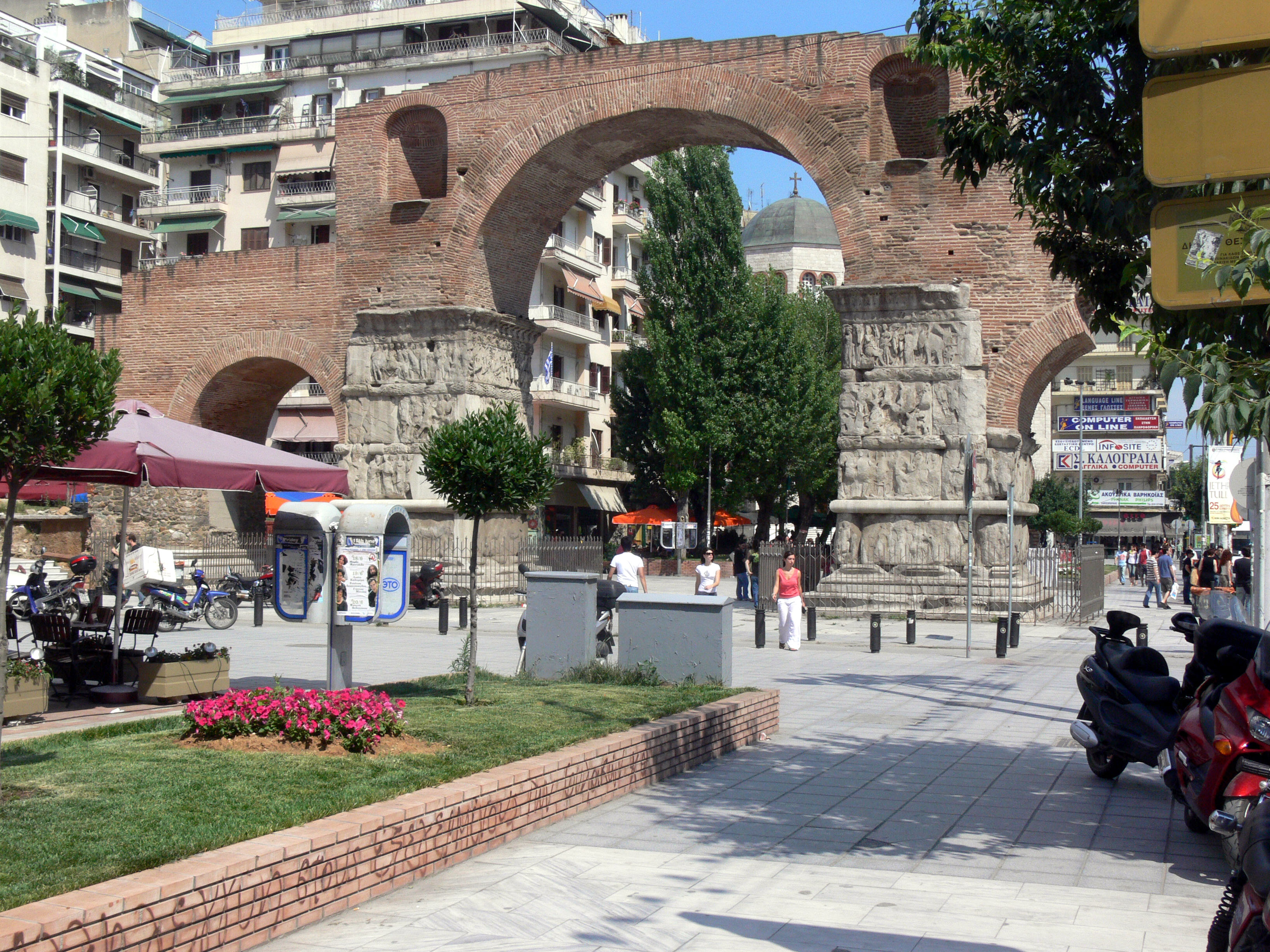 Tessaloniki. Galeriusbogen.